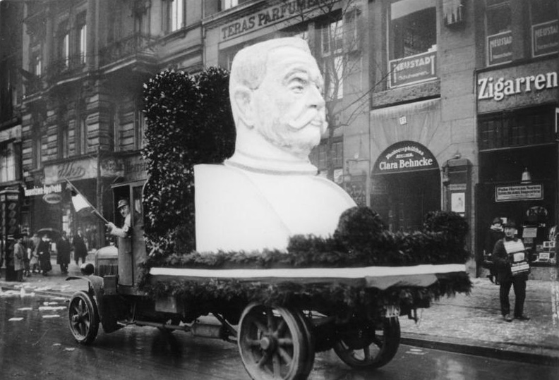 Information added by Wikimedia users.Ergänzung: Das Foto entstand in Berlin, Tauentzienstraße Nr. 13a, vor der „Tauentzien-Apotheke“ (im Bild links).